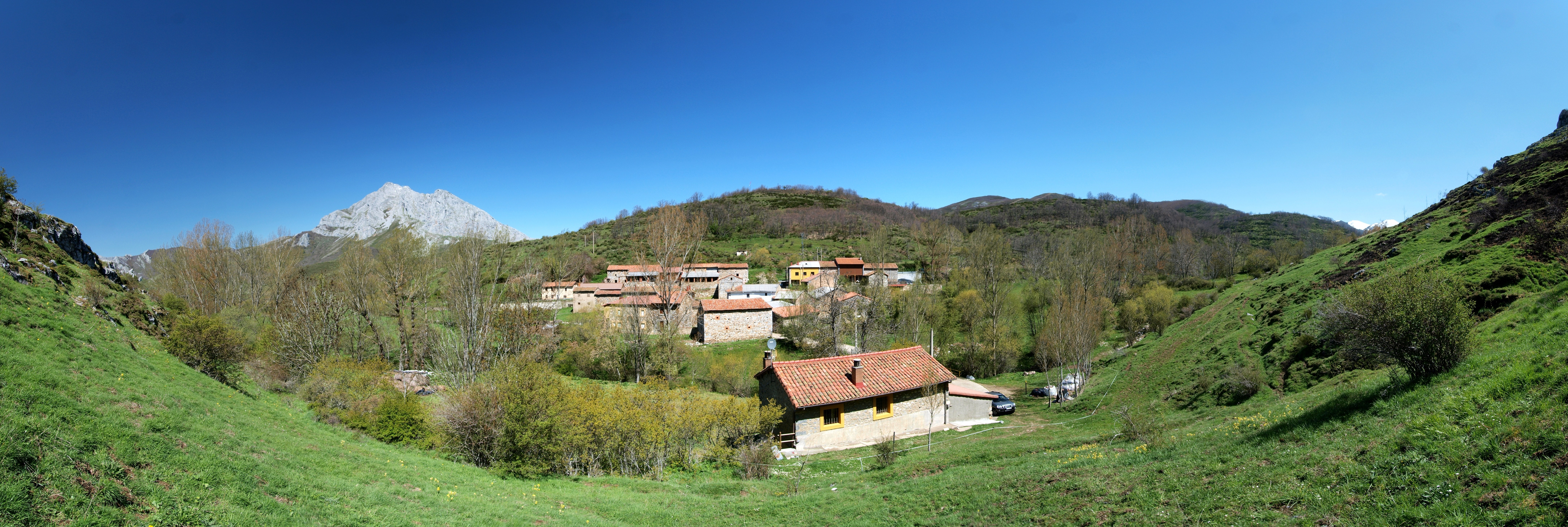 Panoramica San Cibrián